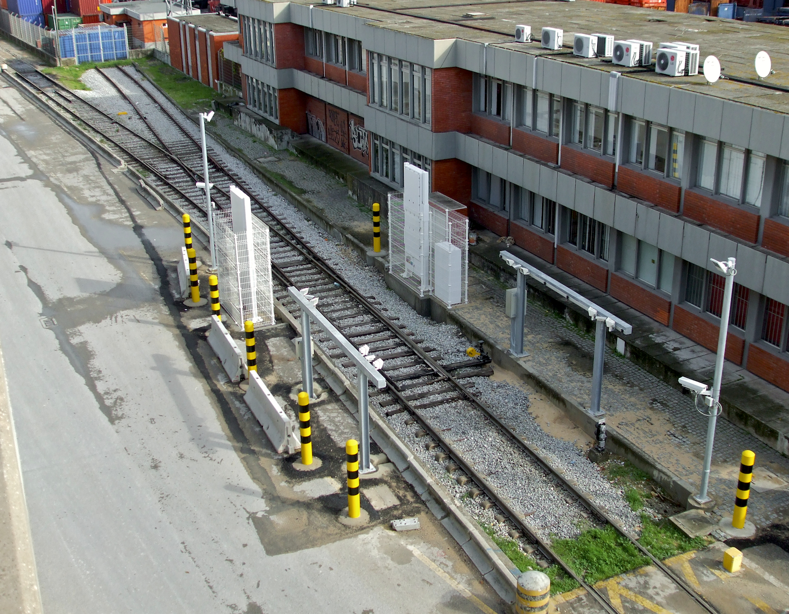 sofisticados dispositivos de segurança (sistema de scanner de Raios X para contentores) na entrada e saída de mercadorias desta zona do Porto de Lisboa. Via férrea: Linha da Matinha [PK 0,5] Local: Santa Apolónia (Lisboa) Data e hora: 29 de Novembro de 2009 [12h06] Sentido: Matinha